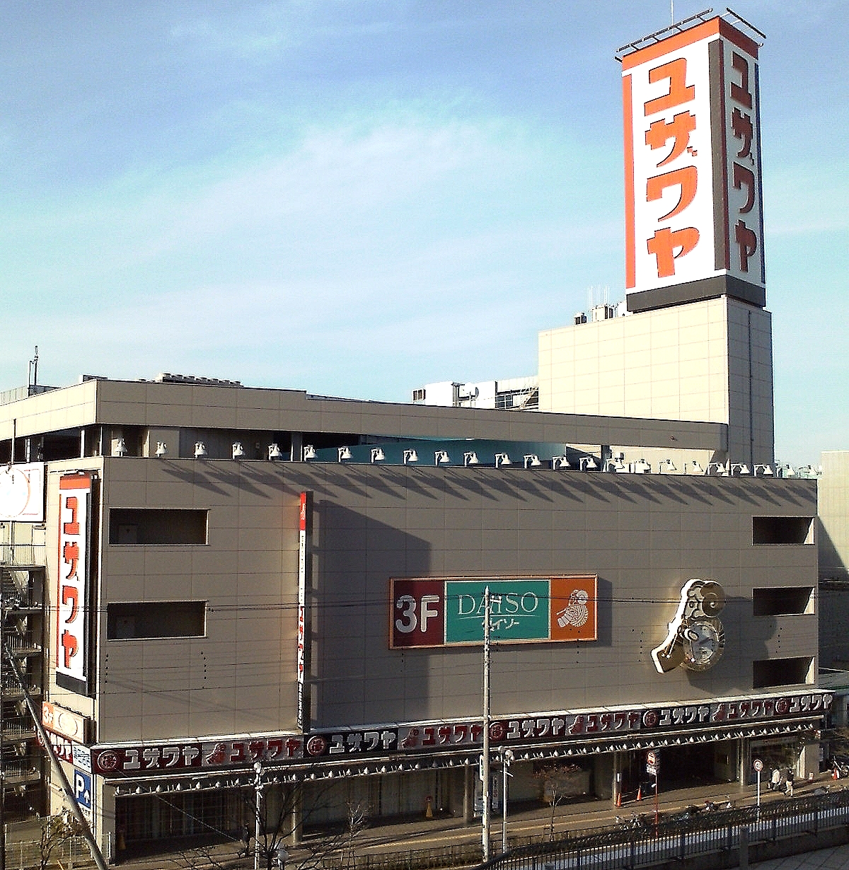 ユザワヤ津田沼店（モリシア津田沼から撮影）